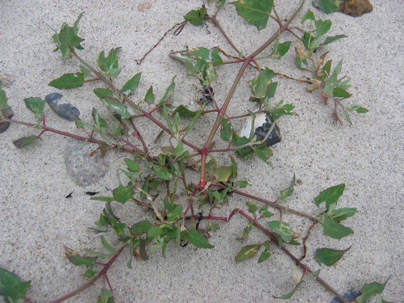 Melde Atriplex sp.